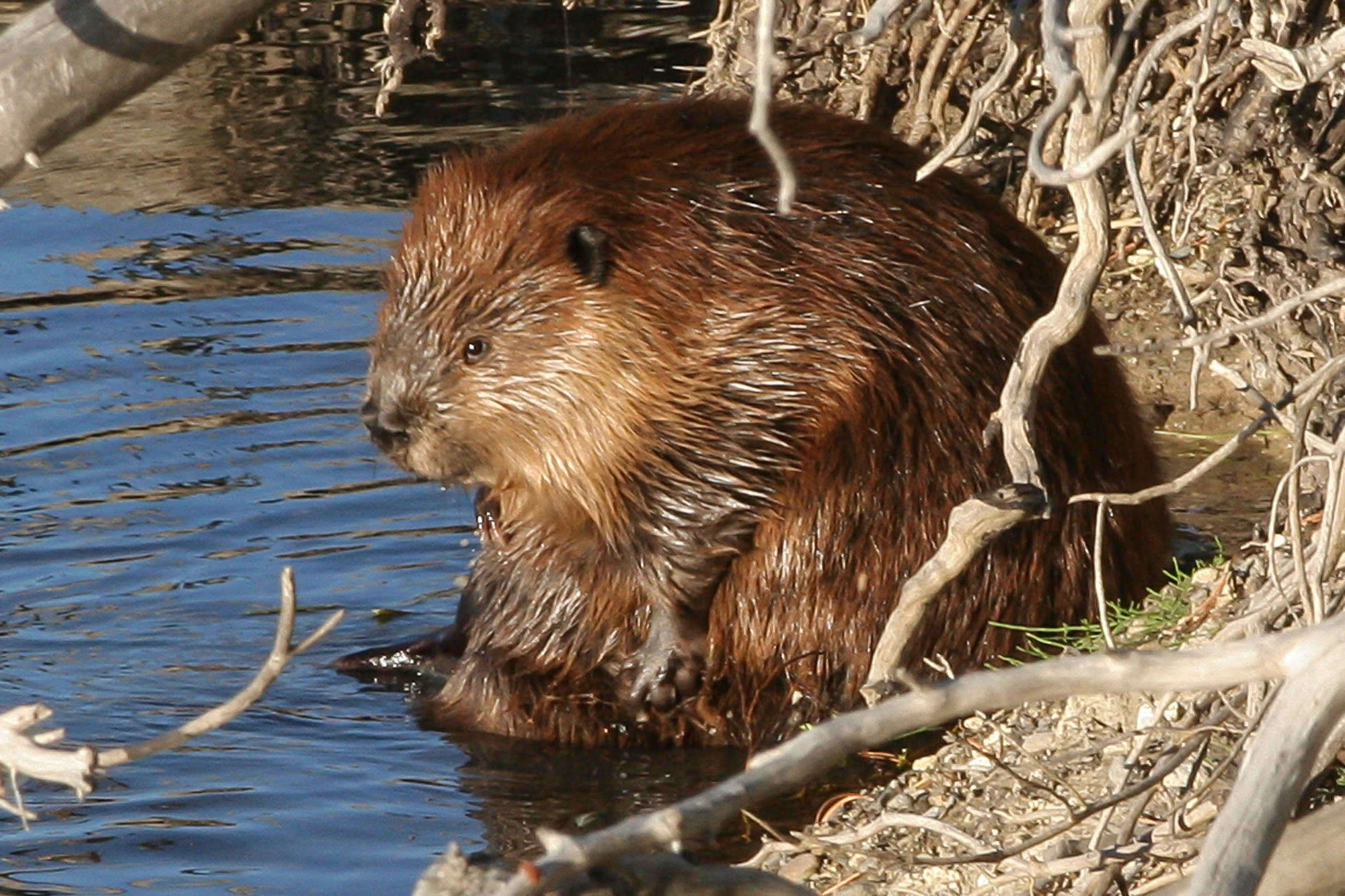 Beaver; Bob Greenburg; August 2007; 20070829_18491d